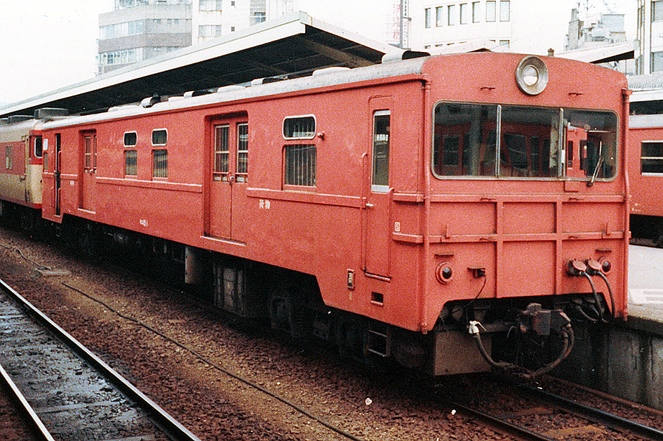 国鉄キニ15 1